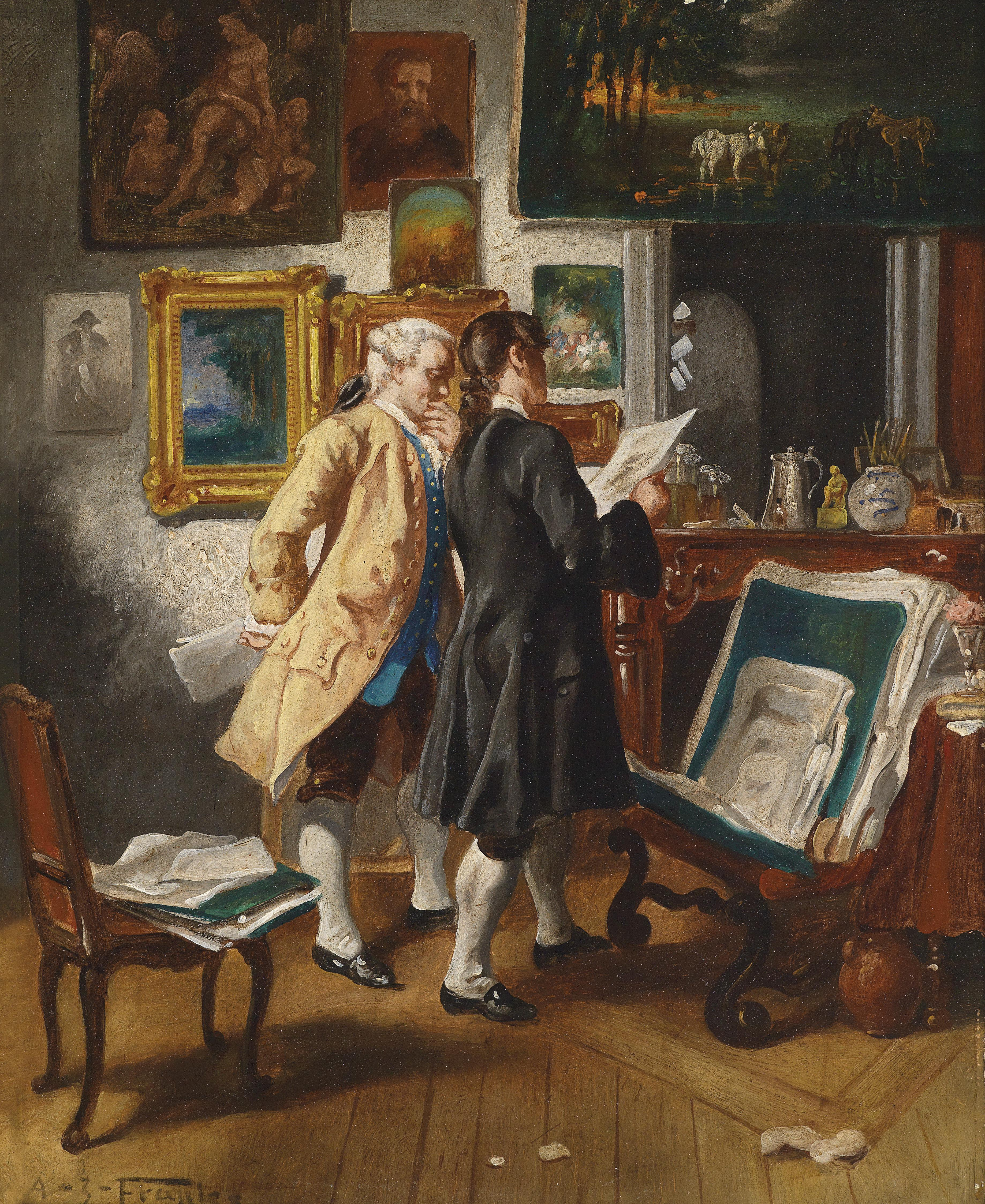 Beim Antiquitätenhändlertitle QS:P1476,de:"Beim Antiquitätenhändler" label QS:Lde,"Beim Antiquitätenhändler"